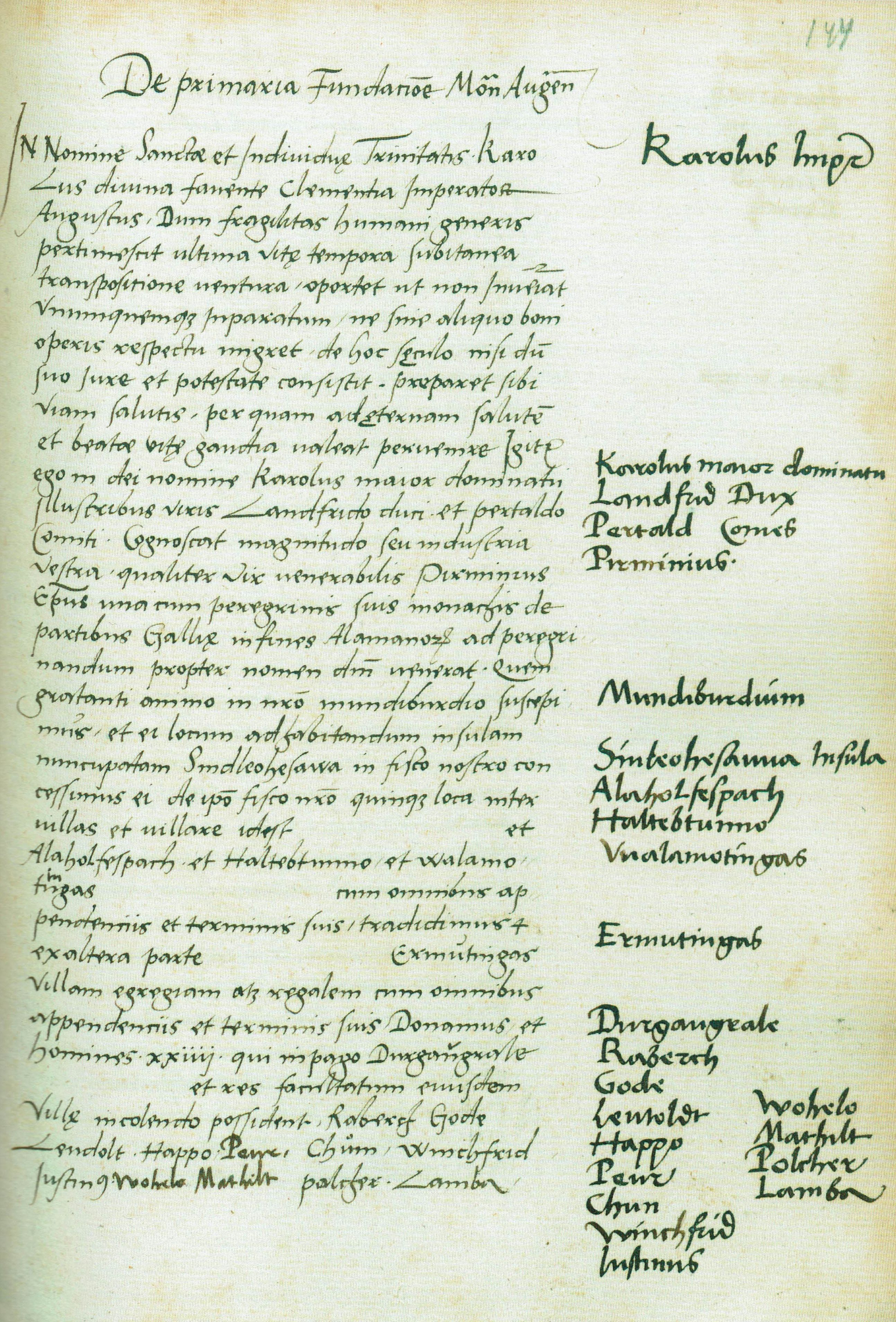 Beginn der ersten Reichenauer Gründungsurkunde. SuStB Augsburg 2° Cod Aug 395, Bl. 144r - Regest bei Rudolf Pokorny: Augiensia (2010), S. 25 Nr. 3.